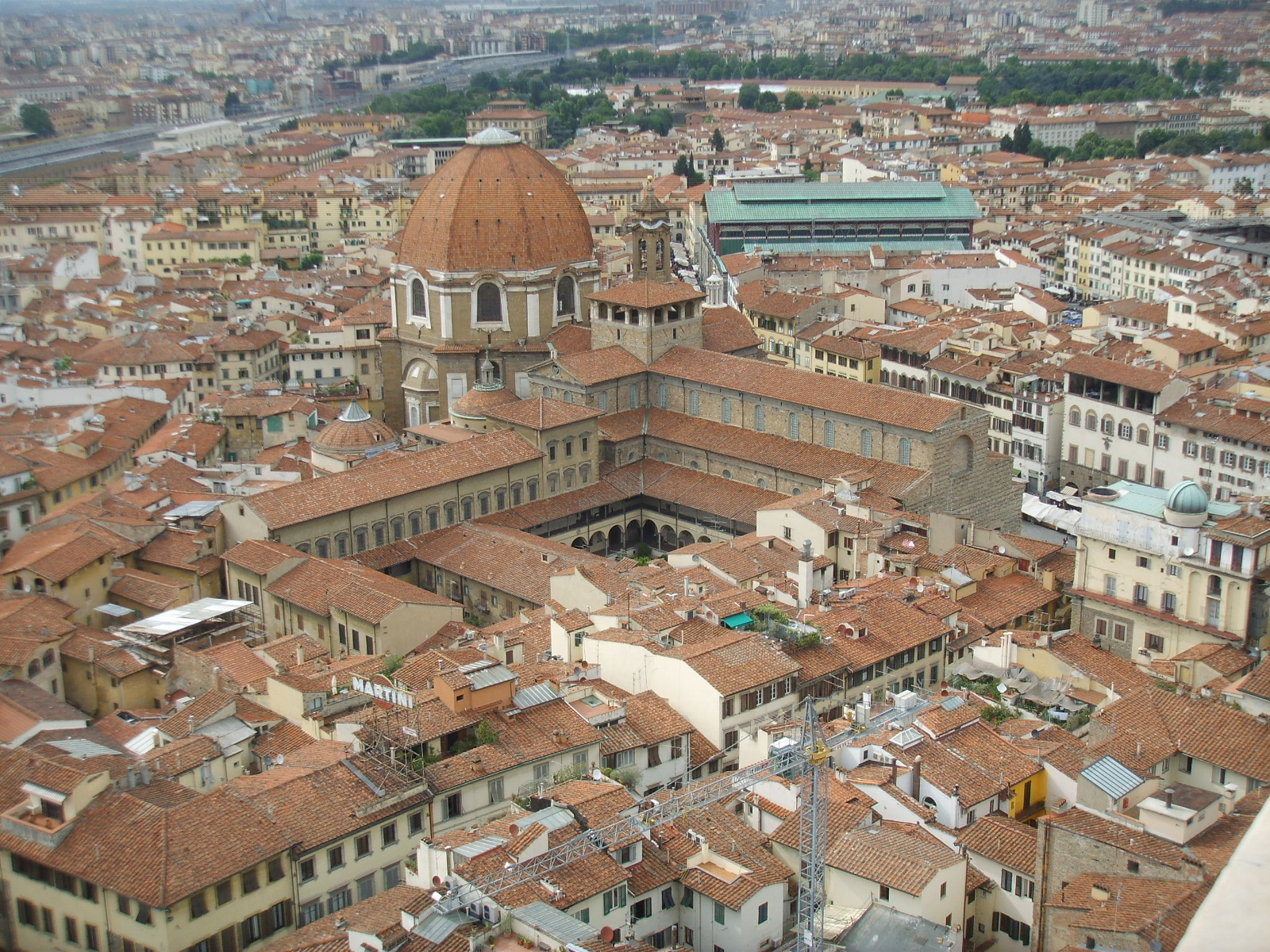 Complesso di san lorenzo